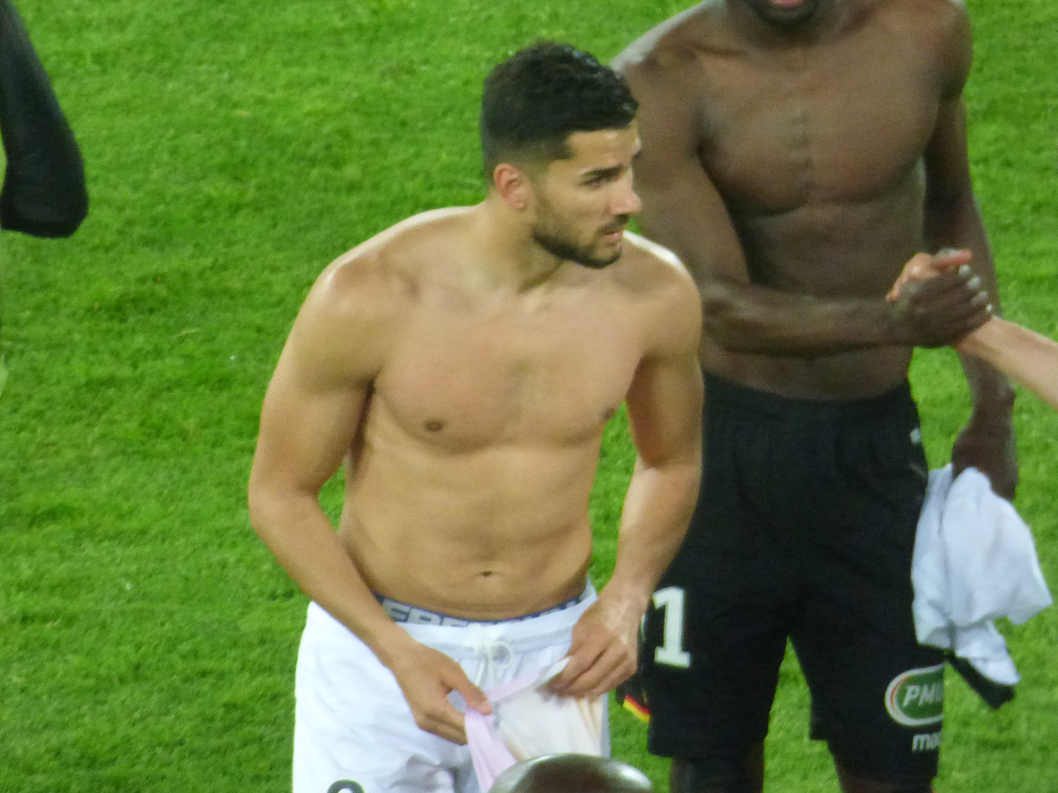 Mehdi Abeid après le match RC Lens / Dijon FCO, match aller des barrages pour la montée en Ligue 1 2018-2019, le 30 juin 2019, au Stade Bollaert-Delelis.